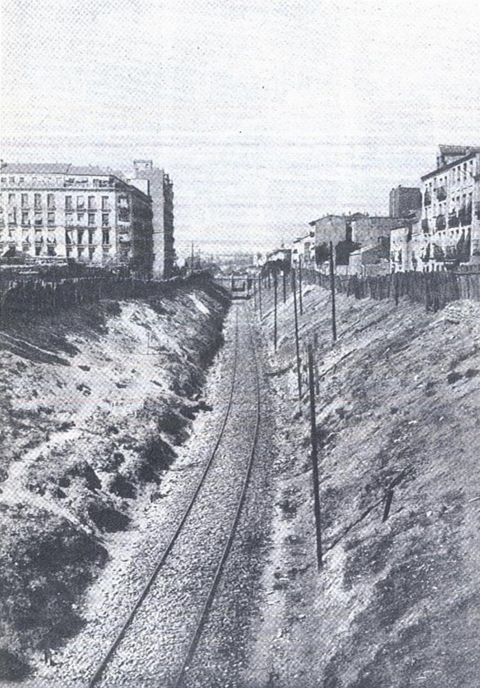 Vista de la trinchera de la calle del Ferrocarril de Madrid en 1912. Por ella circulaba el ferrocarril de contorno